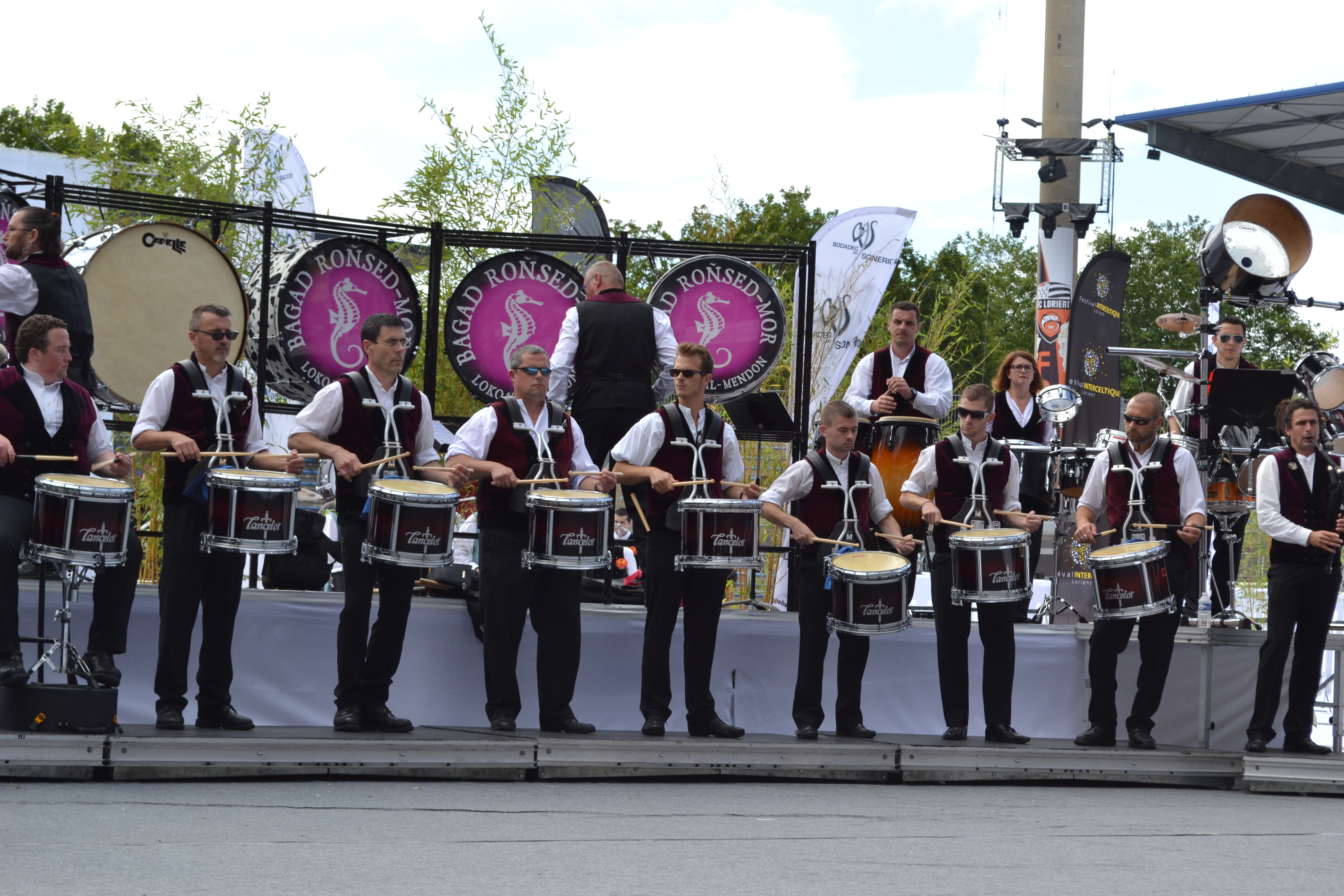 Le bagad Roñsed-Mor (Locoal-Mendon) sur scène au stade du Moustoir pour le championnat 1re catégorie, lors du Festival interceltique de Lorient 2012 (Morbihan, Bretagne).